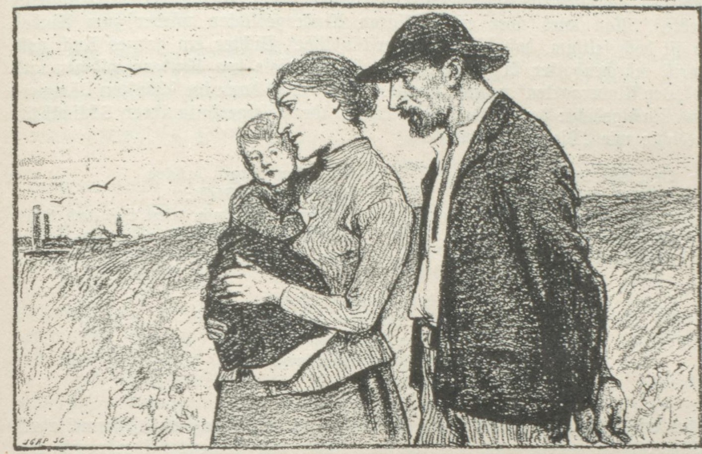 Hans Anetsberger Richard Dehmel Der Arbeitsmann Simplicissimus 1896 Heft 37